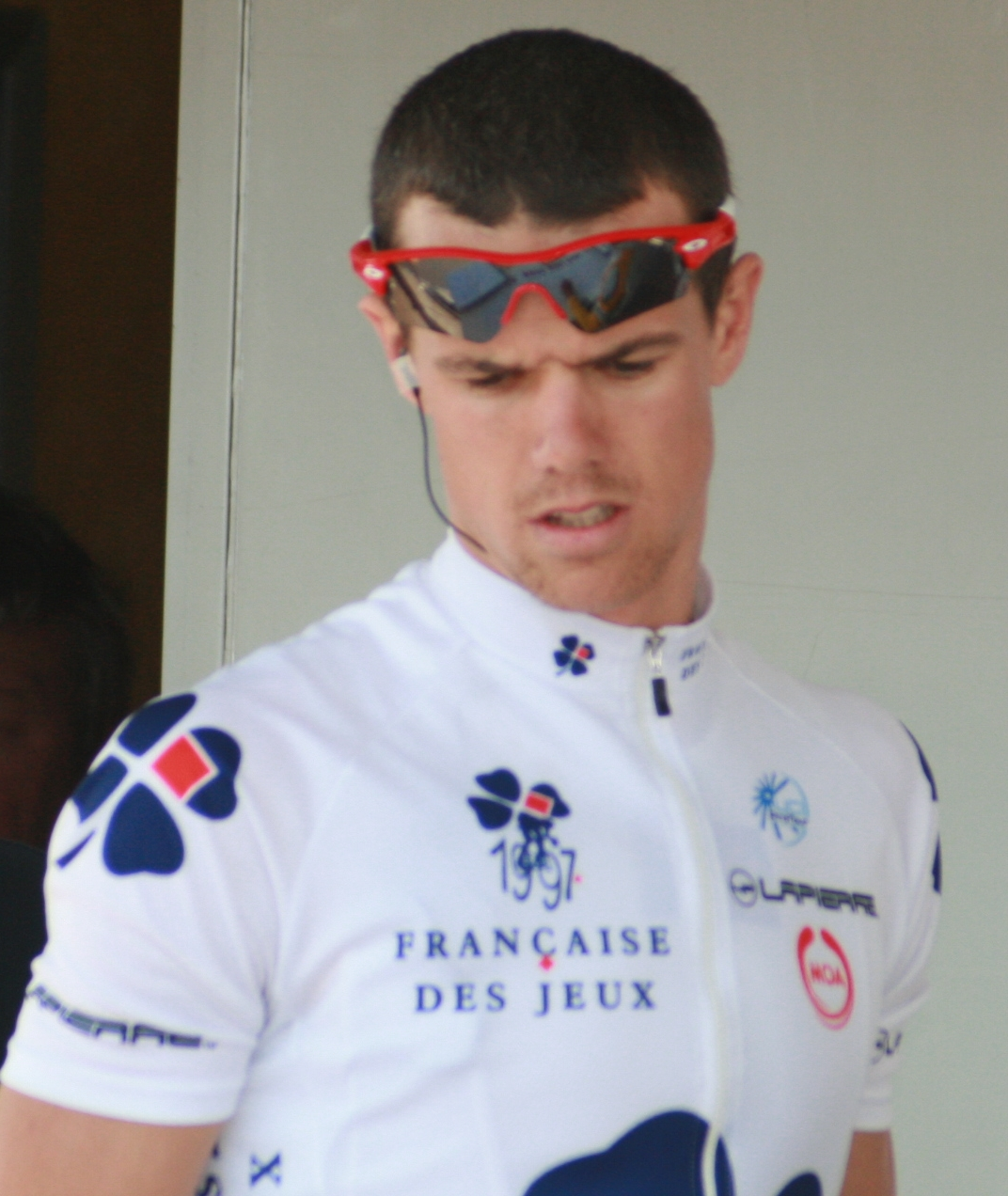 Timothy Gudsell, à l'Eneco Tour 2008, à Ardooie